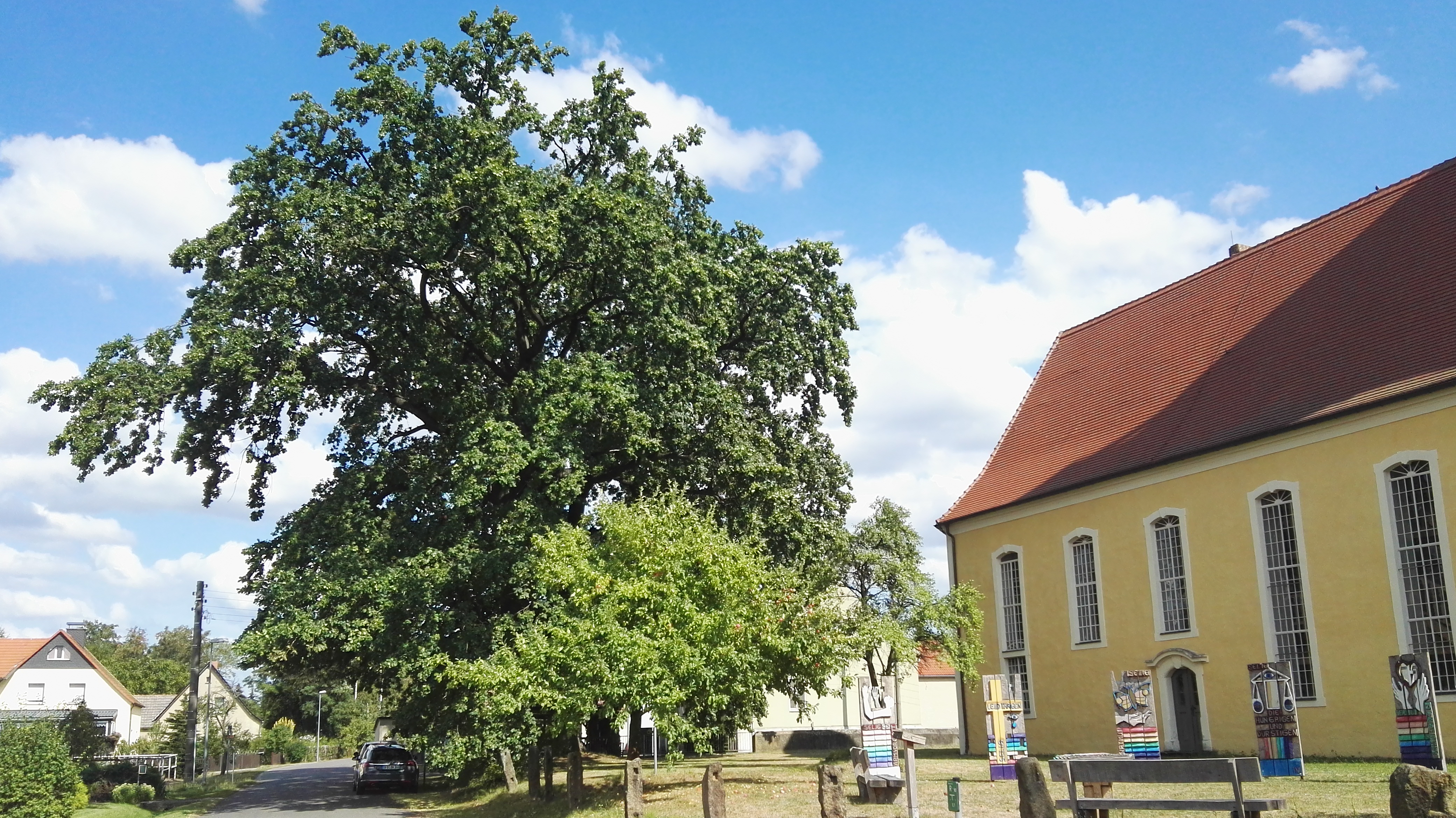 als Naturdenkmal geschützte Stieleiche (1108-5) nördlich der Kirche in Kroppen